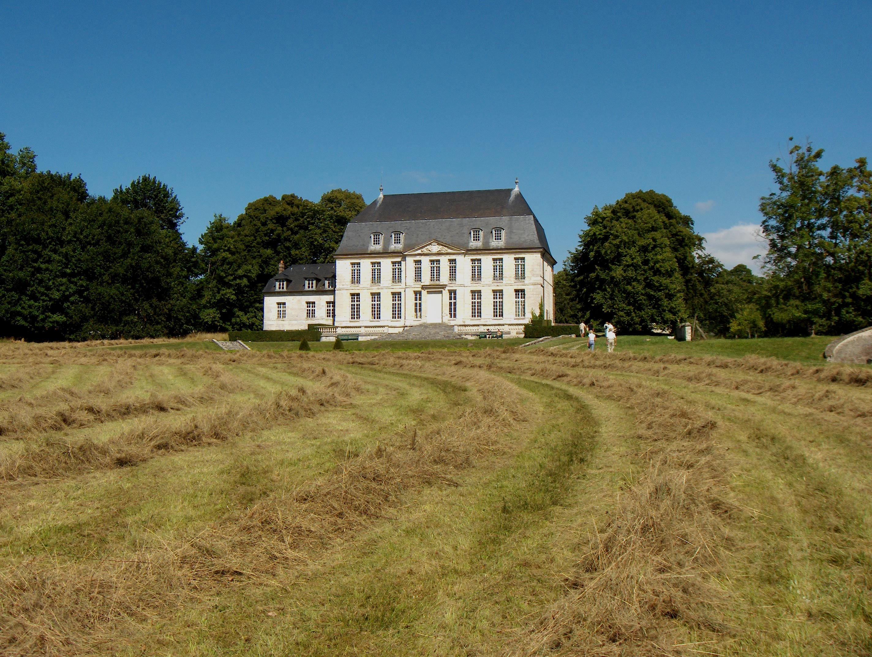 Abtei von Jumièges (Frankreich, Dept. Seine-Maritime), Abtswohnung aus dem 18. Jh.